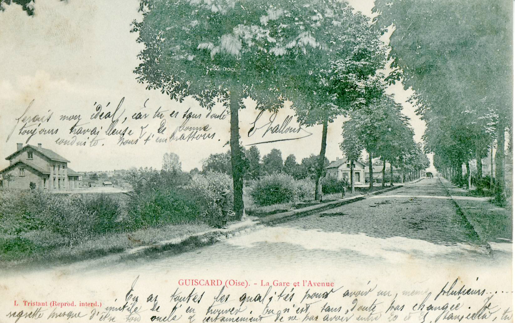 Carte postale ancienne éditée par L. TristantGUISCARD (Oise) : la Gare et l'Avenue